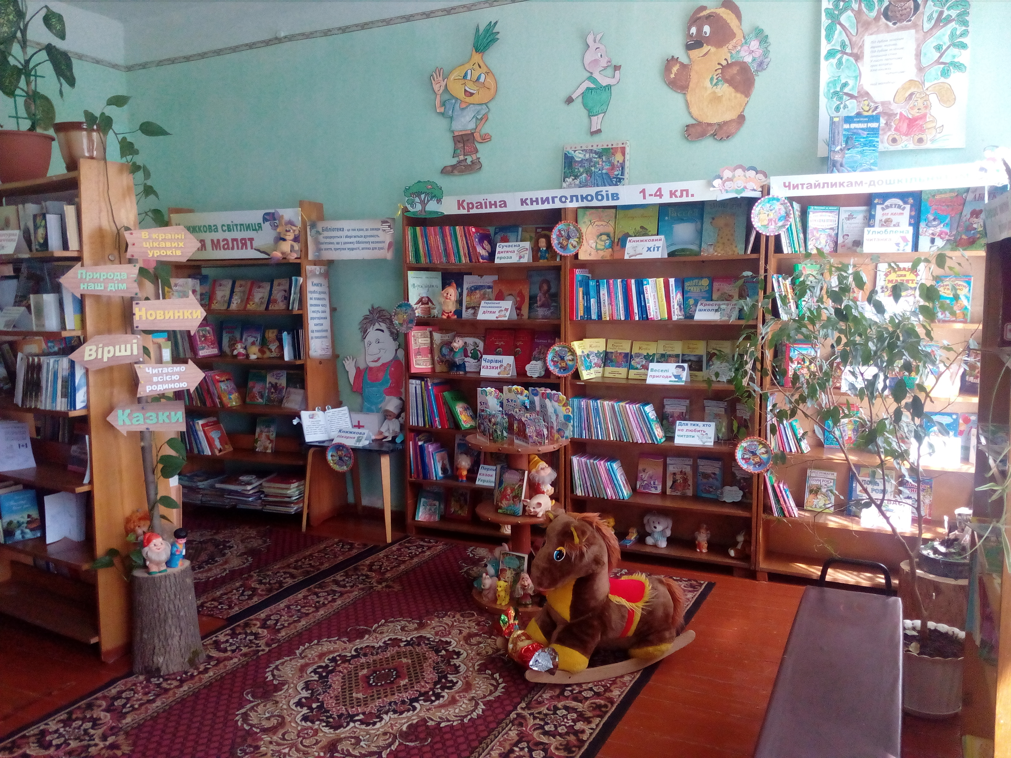 Абонемент для дітей дошкільного та молодшого шкільного віку бібліотеки-філії №14. 2019 рік.